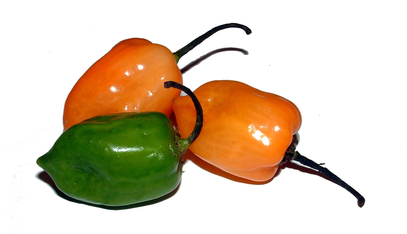 Piment Habanero, Chile Habanero Origine Mexique Auteur : Emmanuel Potez (manu486) Date : 2006